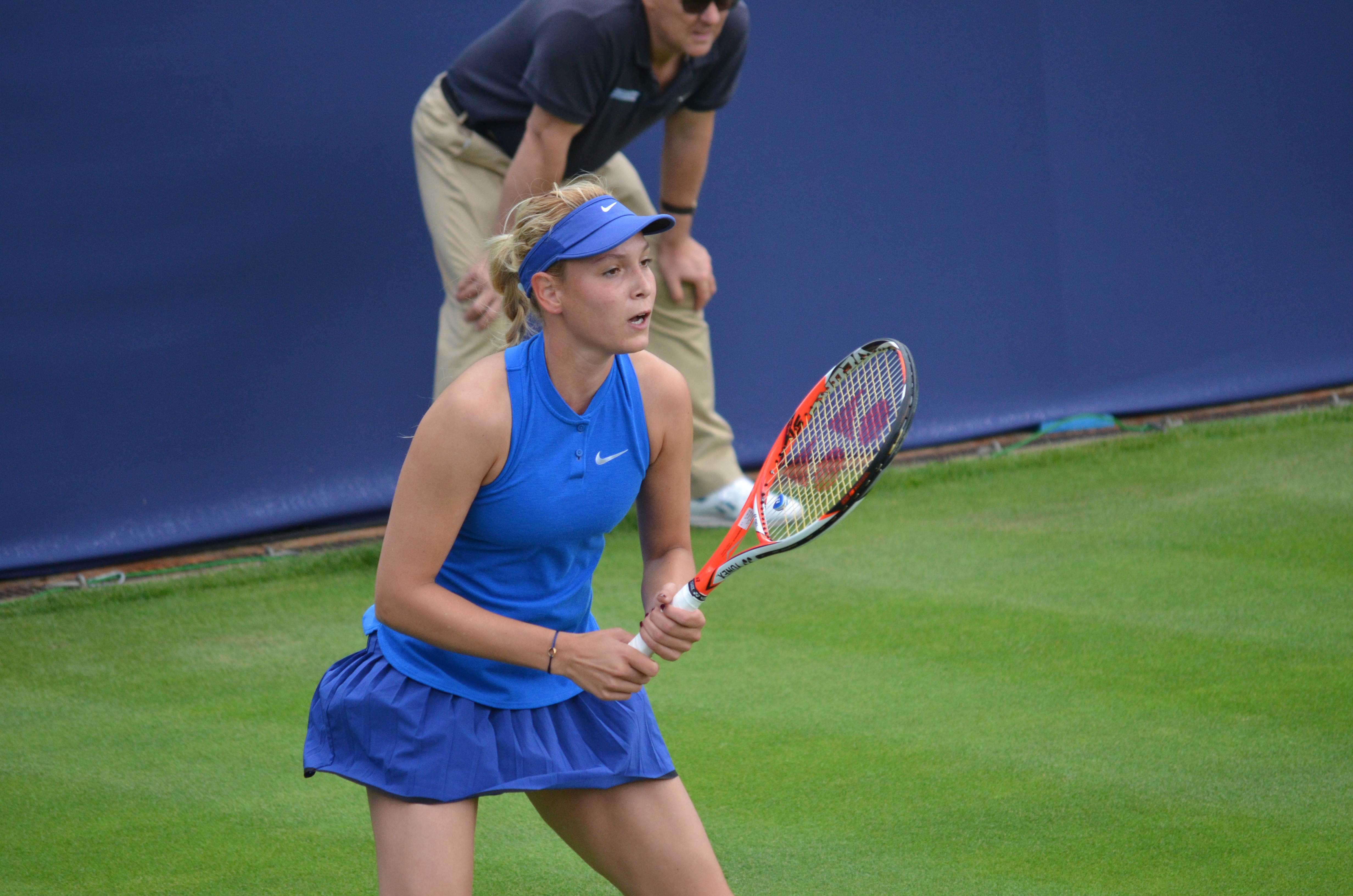 Donna Vekic